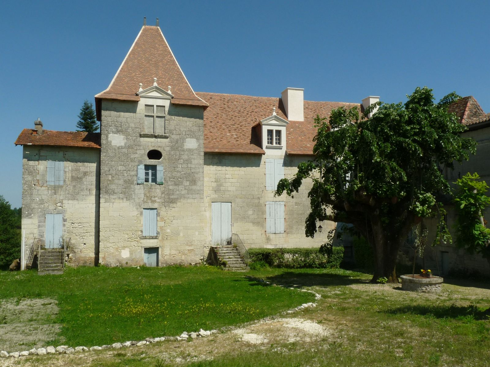 château de Bonnes, Charente, France